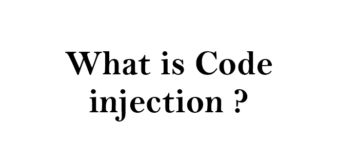 Монгол: Кодын тарилга гэж юу вэ?